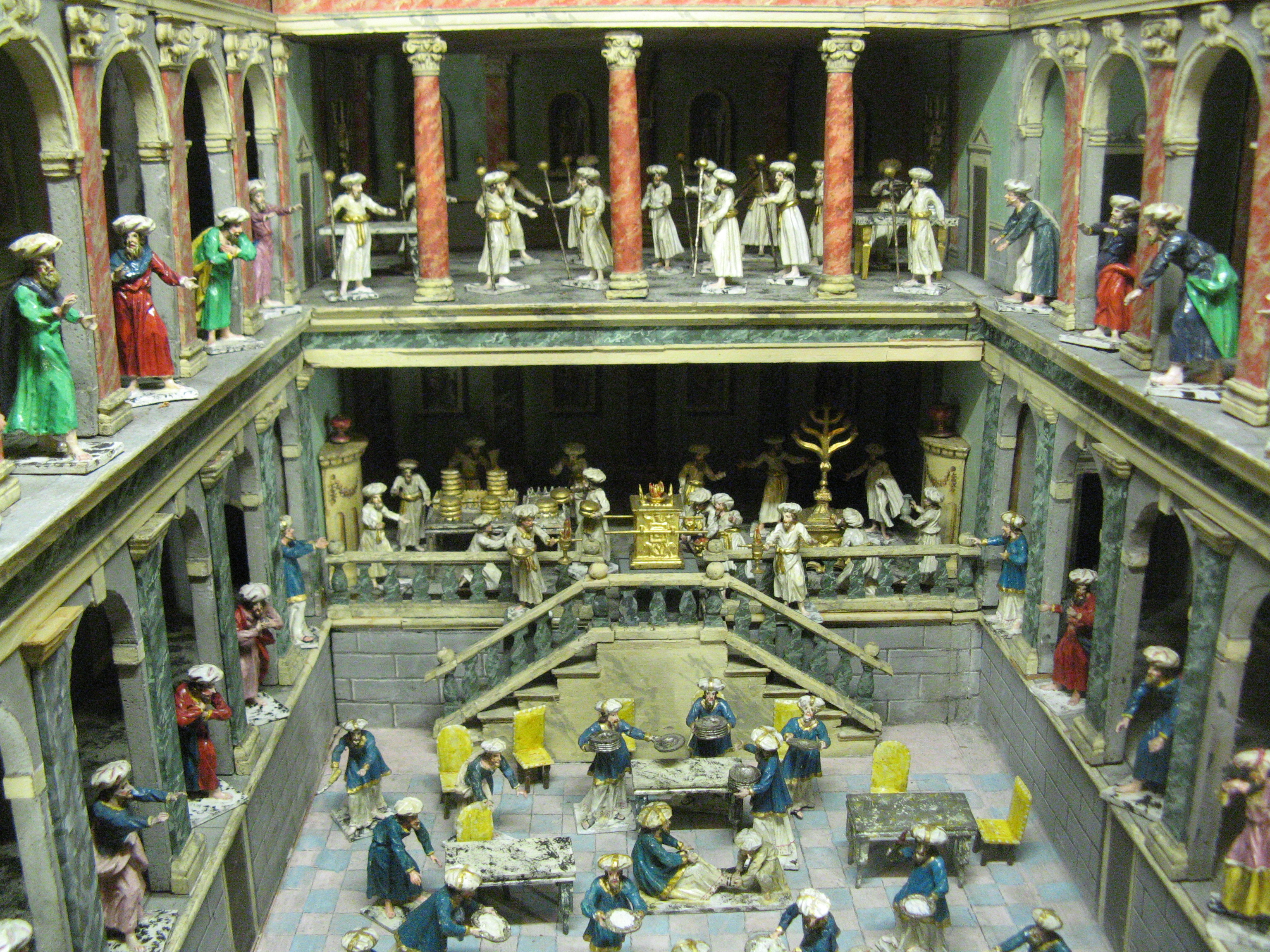 Augustin Alois Probst: Unblutiges Opfer im Tempelinneren, Schaubrote, Krippenmuseum Brixen